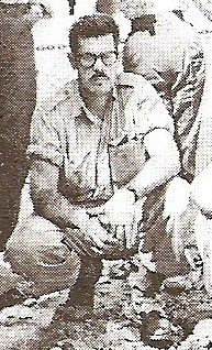 Rafael Martínez Escarbassiere biólogo y malacólogo venezolano.